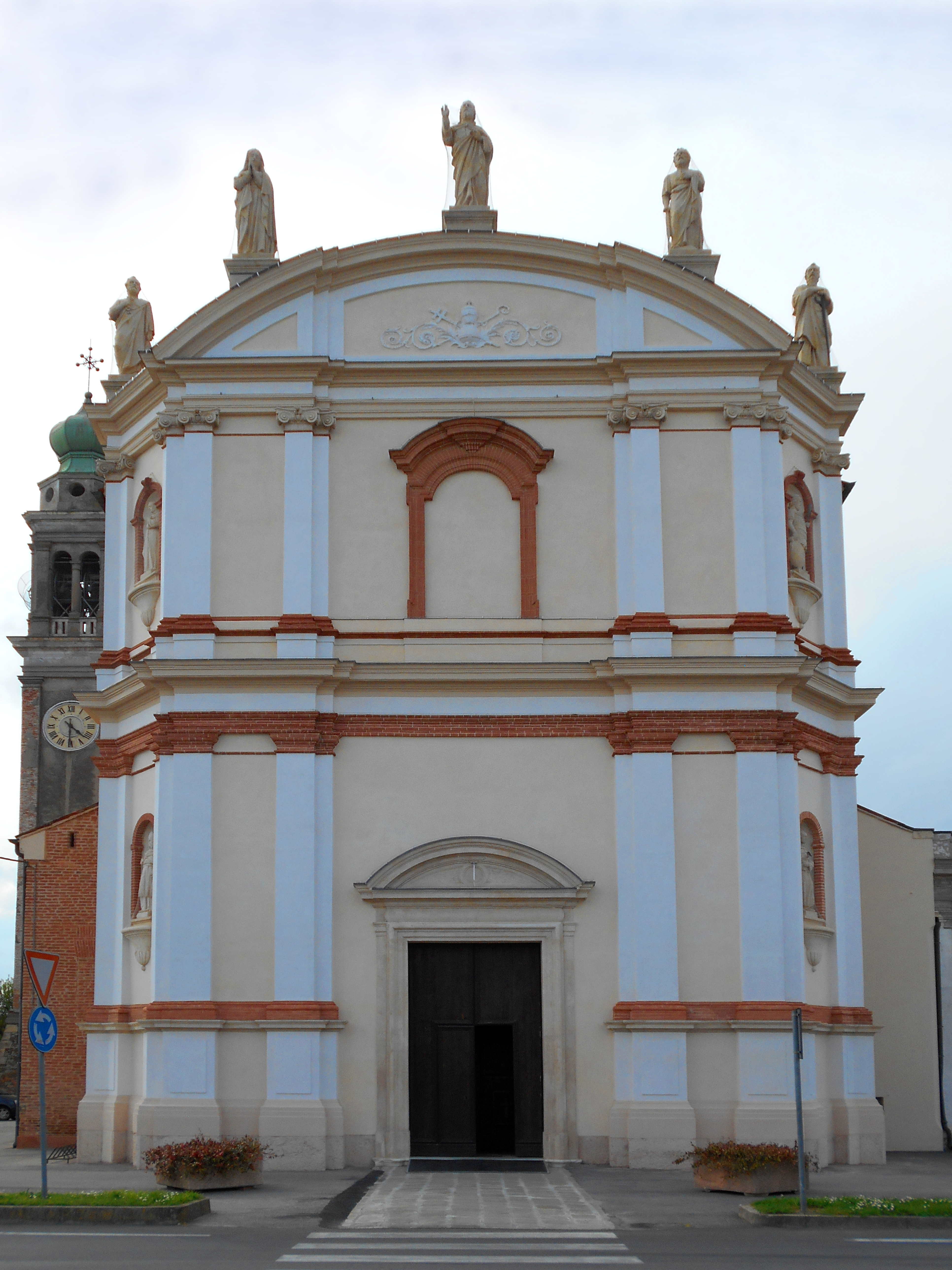 Vighizzolo d'Este, chiesa parrocchiale di San Giovanni Battista.